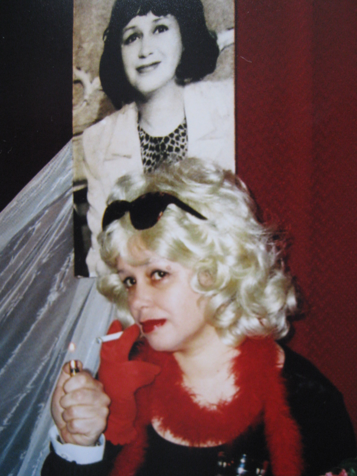 Сцена из спектакля "Идеальная пара" Санкт-Петербургского драматического театра "Патриот" РОСТО. В роли Катьки заслуженная артистка России Татьяна Кудрявцева.